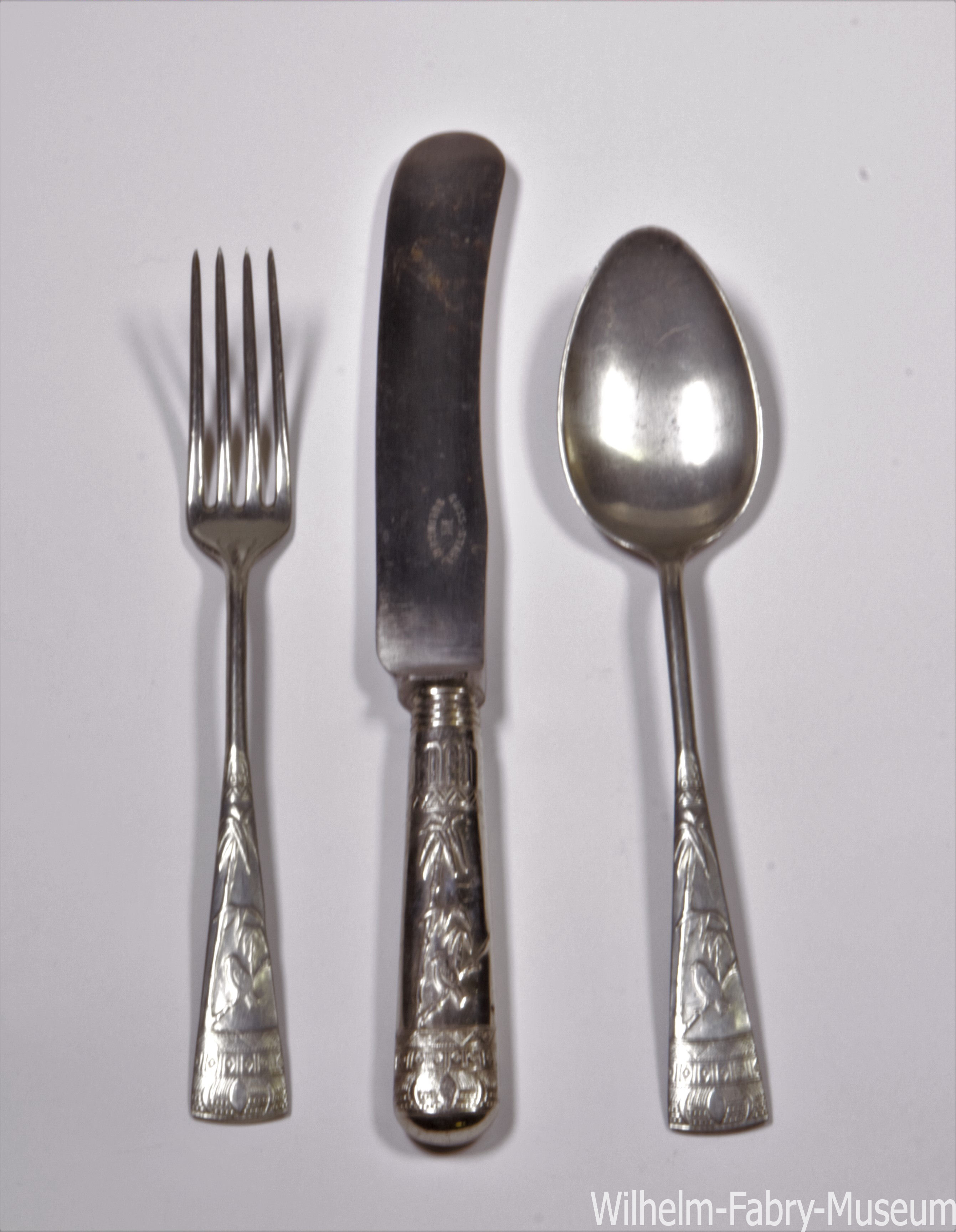 Ansicht Bestecke Heimendahl & Keller